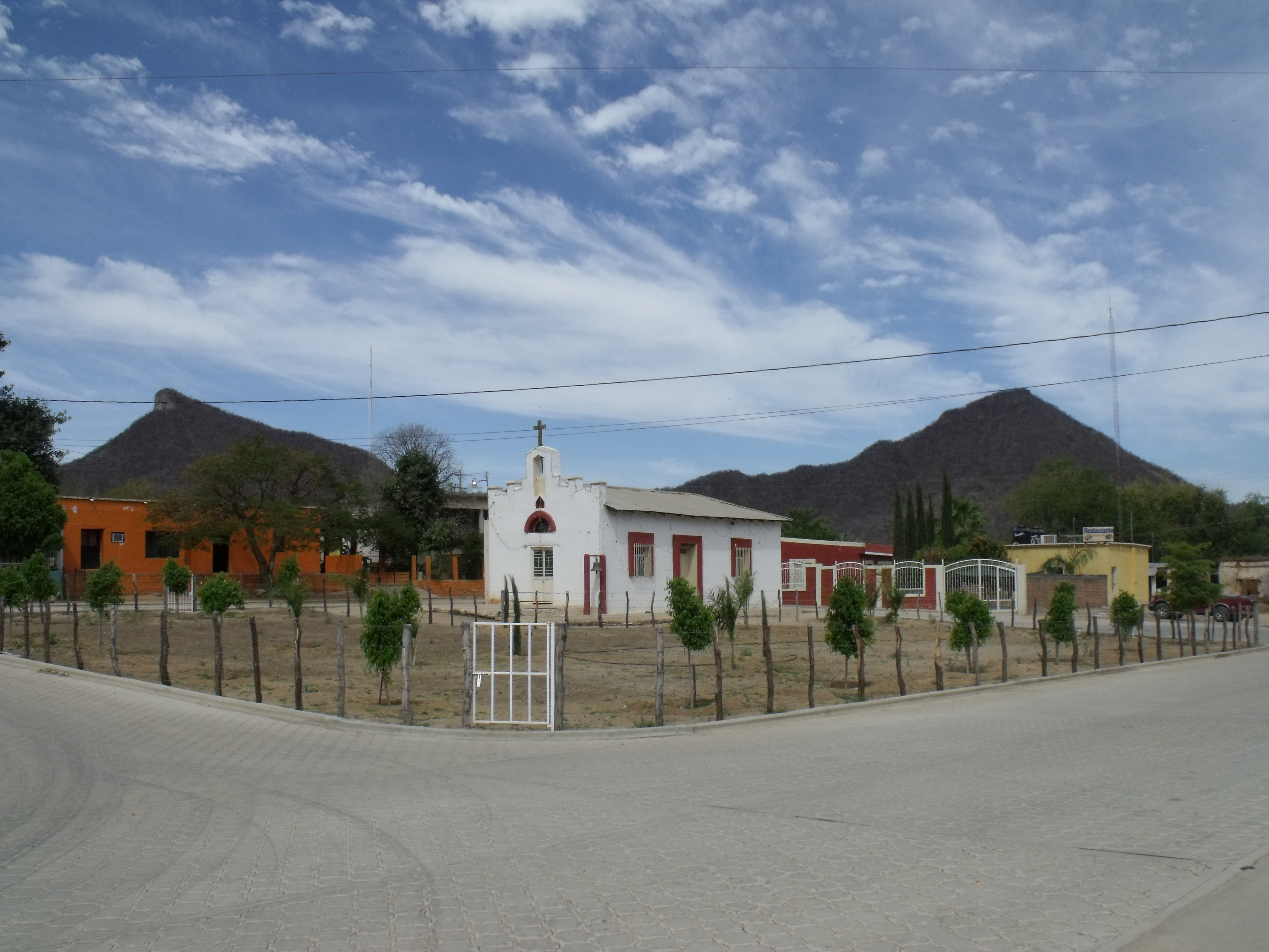 Calle central e iglesia de San Bernardo, Sonora